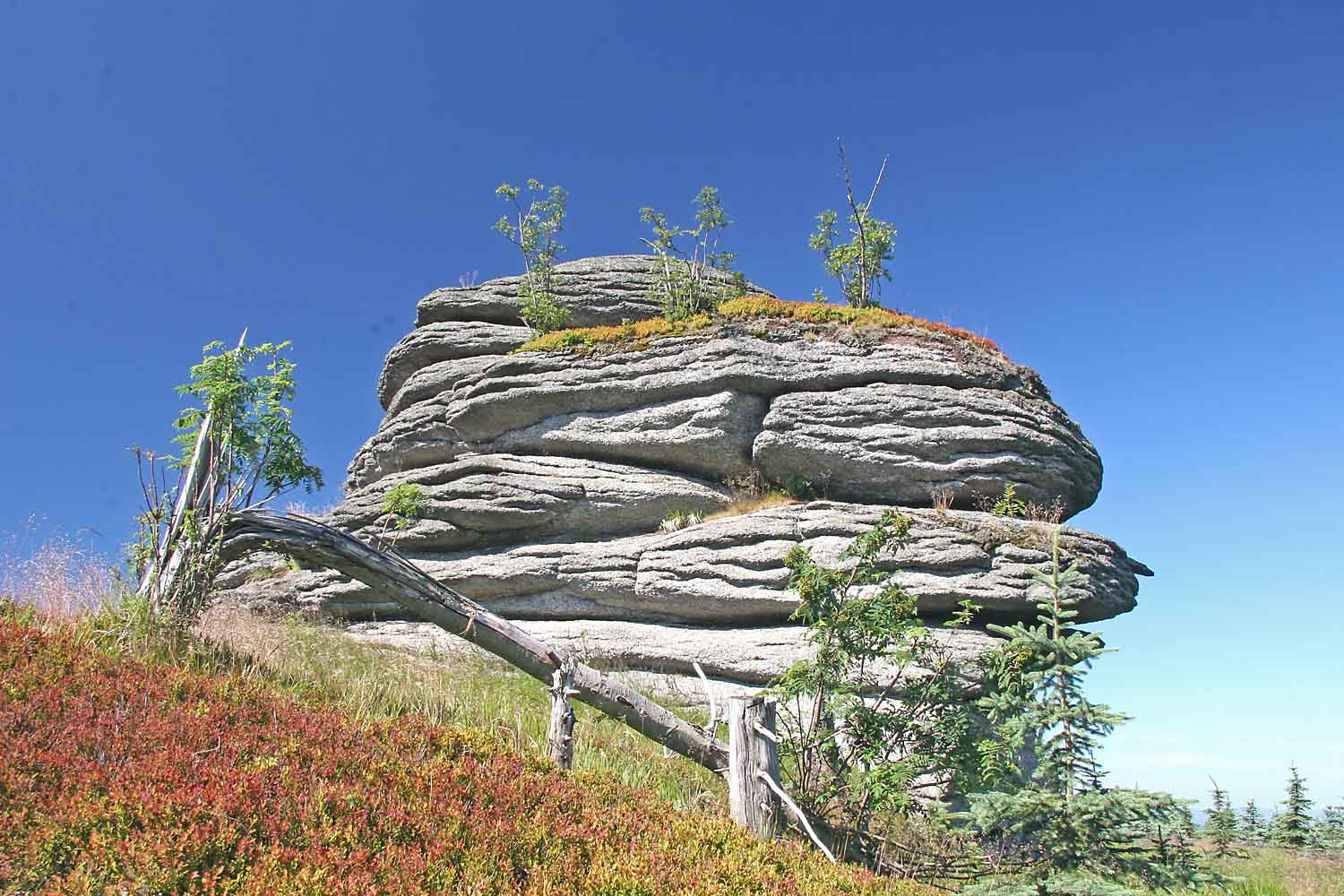 Pytlácká skála 972 m, Jizera Mountains, Czech Republic Autor:Prazak Date: 18. 7. 2006